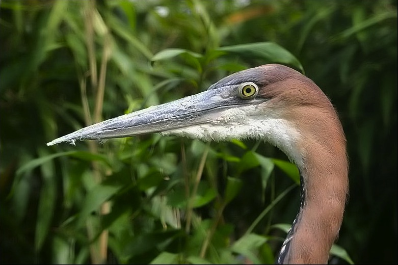 Goliathreiher (Ardea goliath), Kölner Zoo.